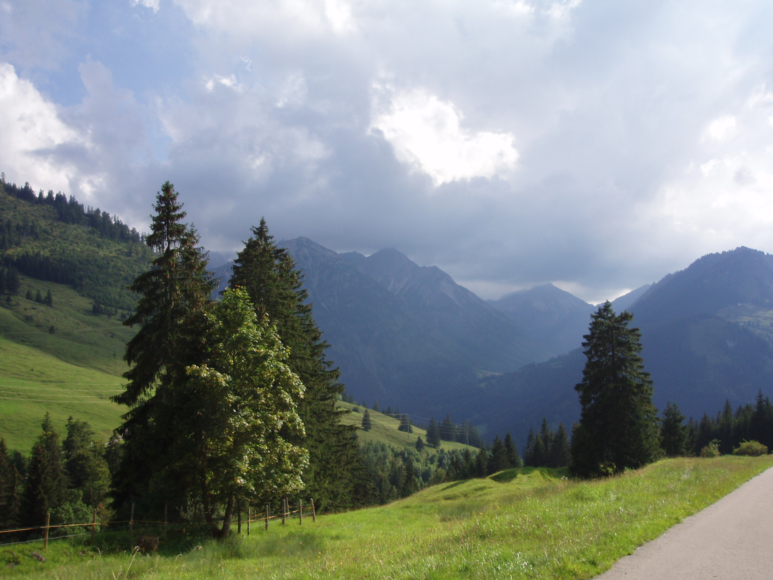 bei Oberjoch